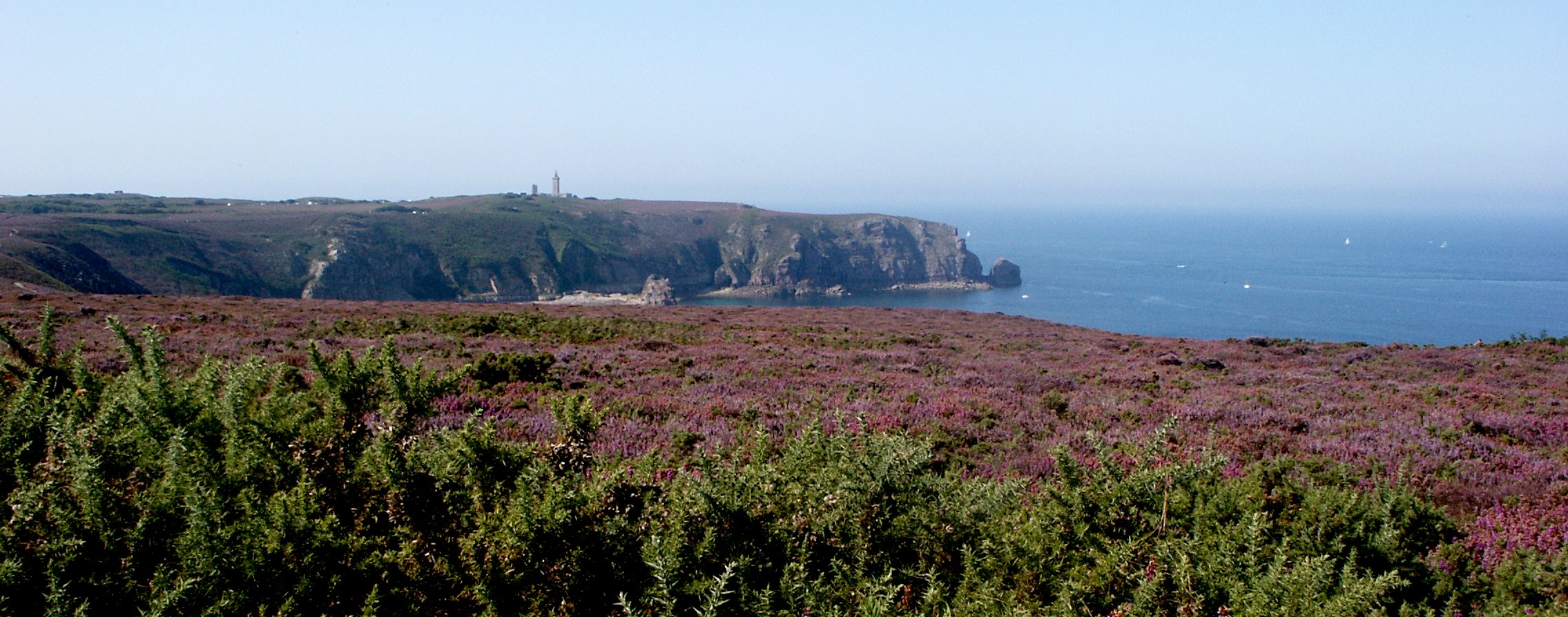 La lande de bruyère au Cap Fréhel